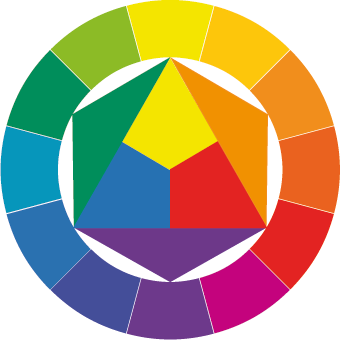 Bildbeschreibung: Farbkreis nach Johannes Itten (1961) Datum: 1.4.2006 Sonstiges: Zeichnung wurde mit InDesign erstellt, Datei liegt im Vektorformat vor, bei Änderungen die Datei von MalteAhrens AT arcor PUNKT de